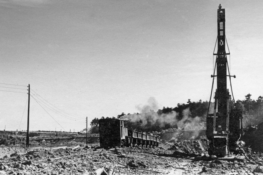 Zug der Abraumbahn in der Grube Messel